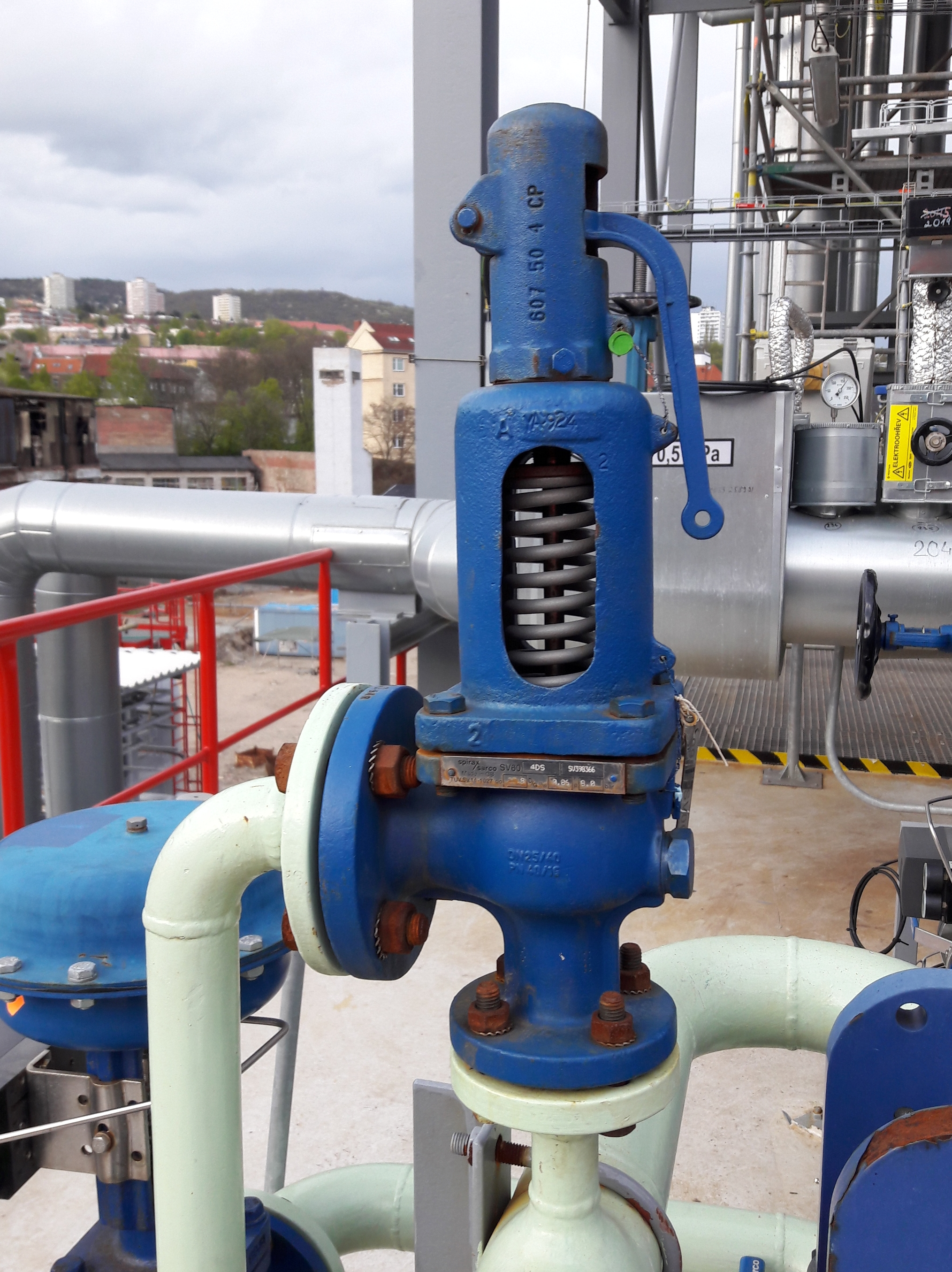 Pressure relief valve DN25 on cooling water from PHE.